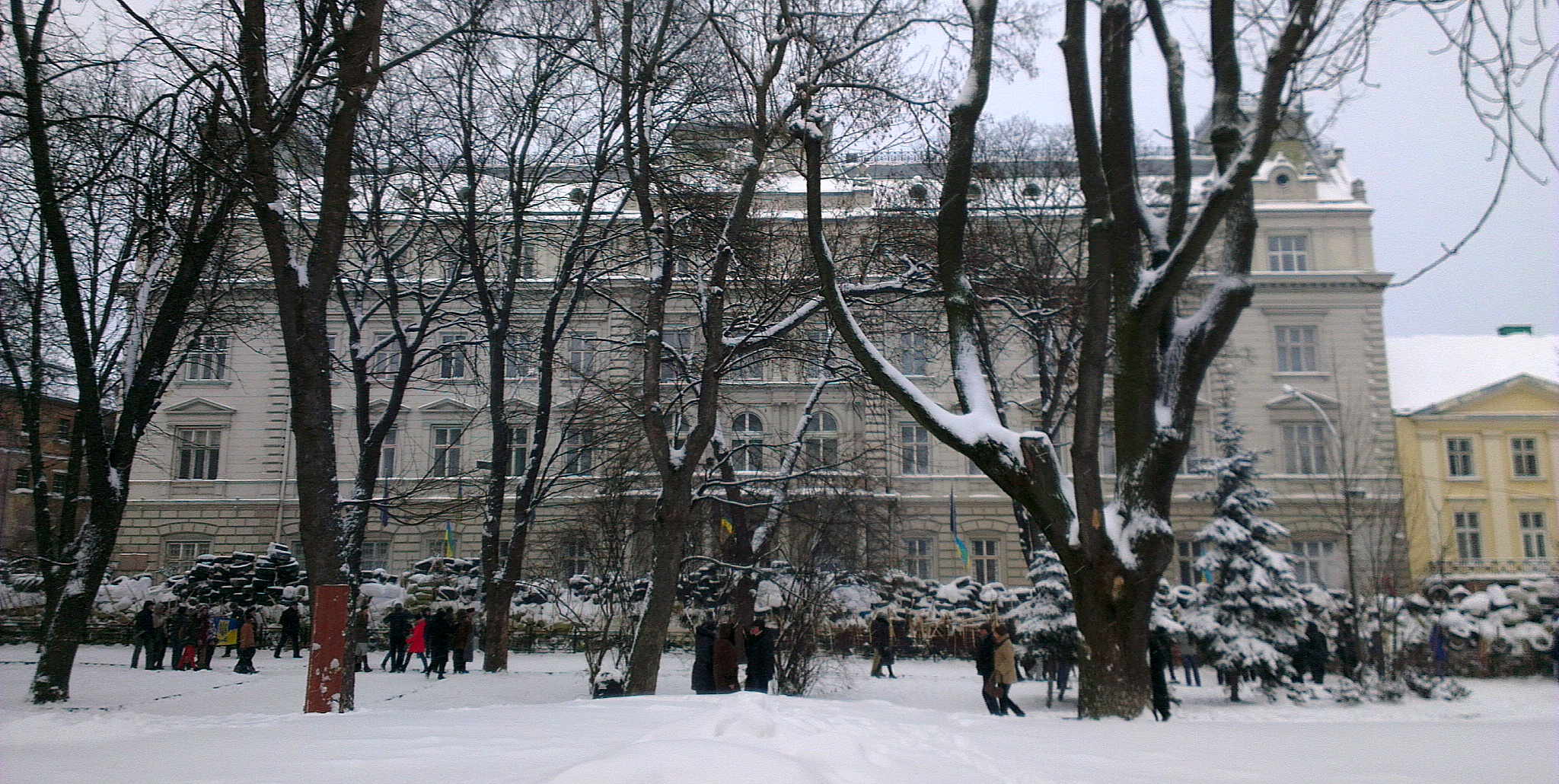 Львовская областная госадминистрация, захваченная в января 2014 года с укреплениями из автомобильных шин и мешков